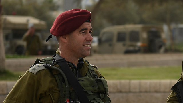 נמרוד אלוני (קצין)